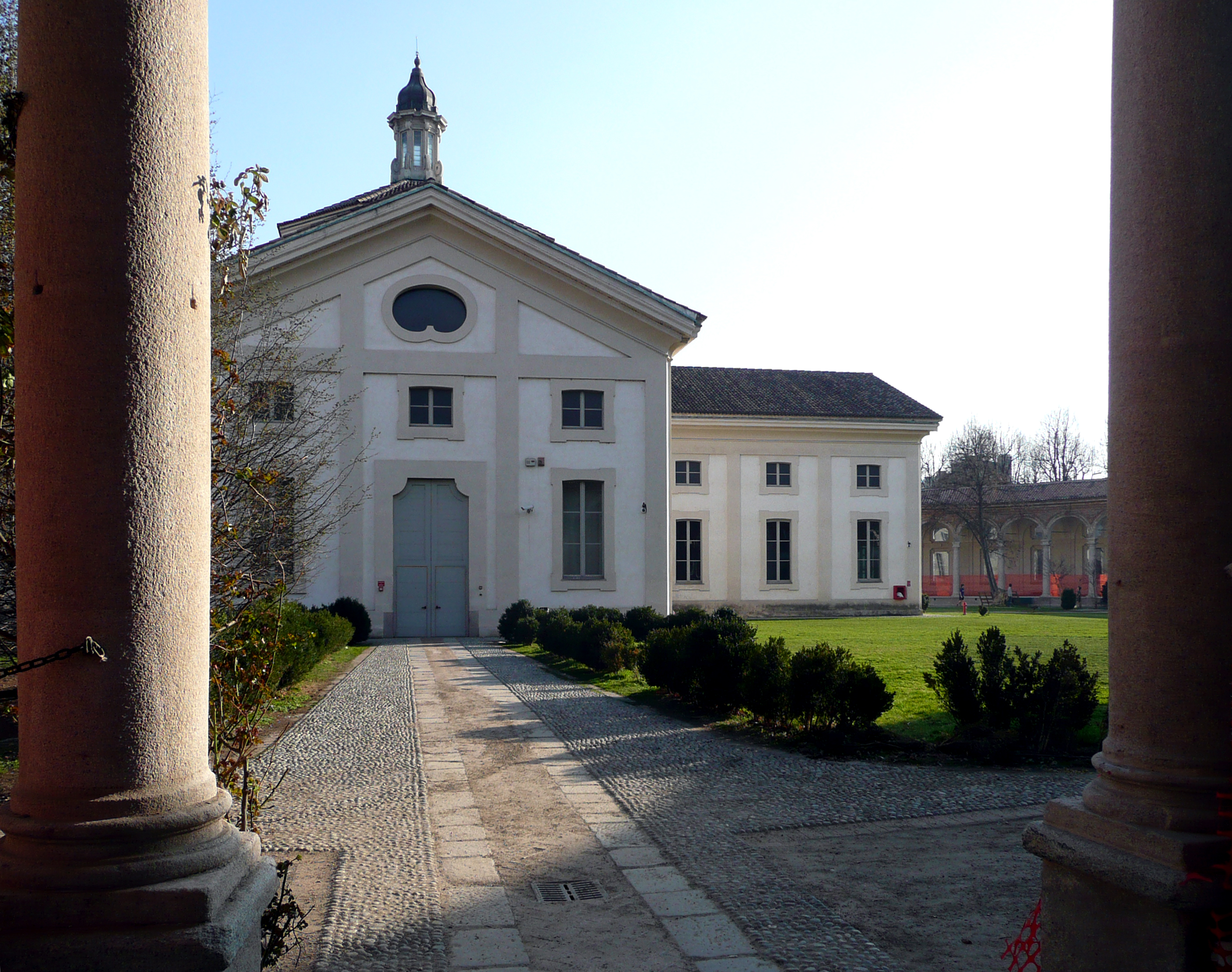 Rotonda della Besana, ex chiesa di San Michele ai nuovi sepolcri, anticamente detta Foppone dell'ospedale maggiore, con funzioni cimiteriali fino al 1783. Fronte della chiesa edificata da Attilio Arrigoni visto dal portico.